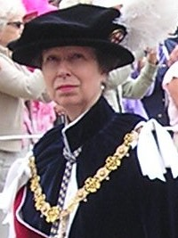 2006年6月19日、プリンセス・ロイヤル・アン